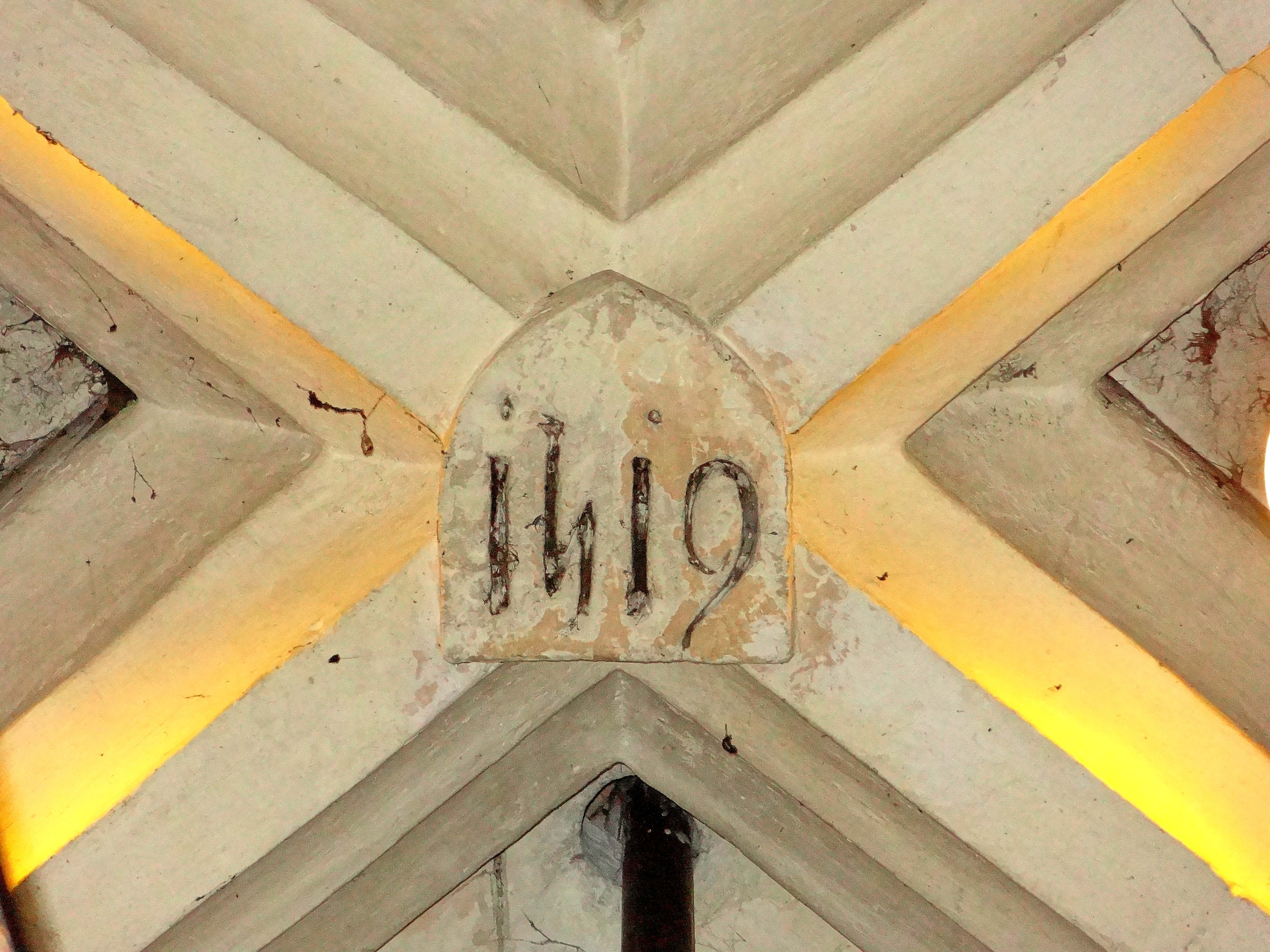 Intérieur de l'église - voir titre.